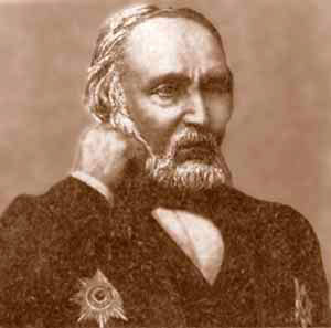 Bernhard Dorn (1805–1881), namhafter Orientalist.